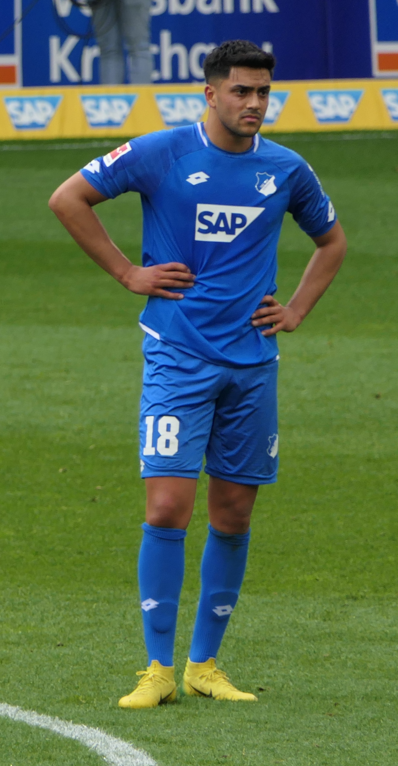 Der Fussballprofi Nadiem Amiri im Trikot der TSG 1899 Hoffenheim beim Heimspiel gegen den SV Werder Bremen am 11.05.2019.